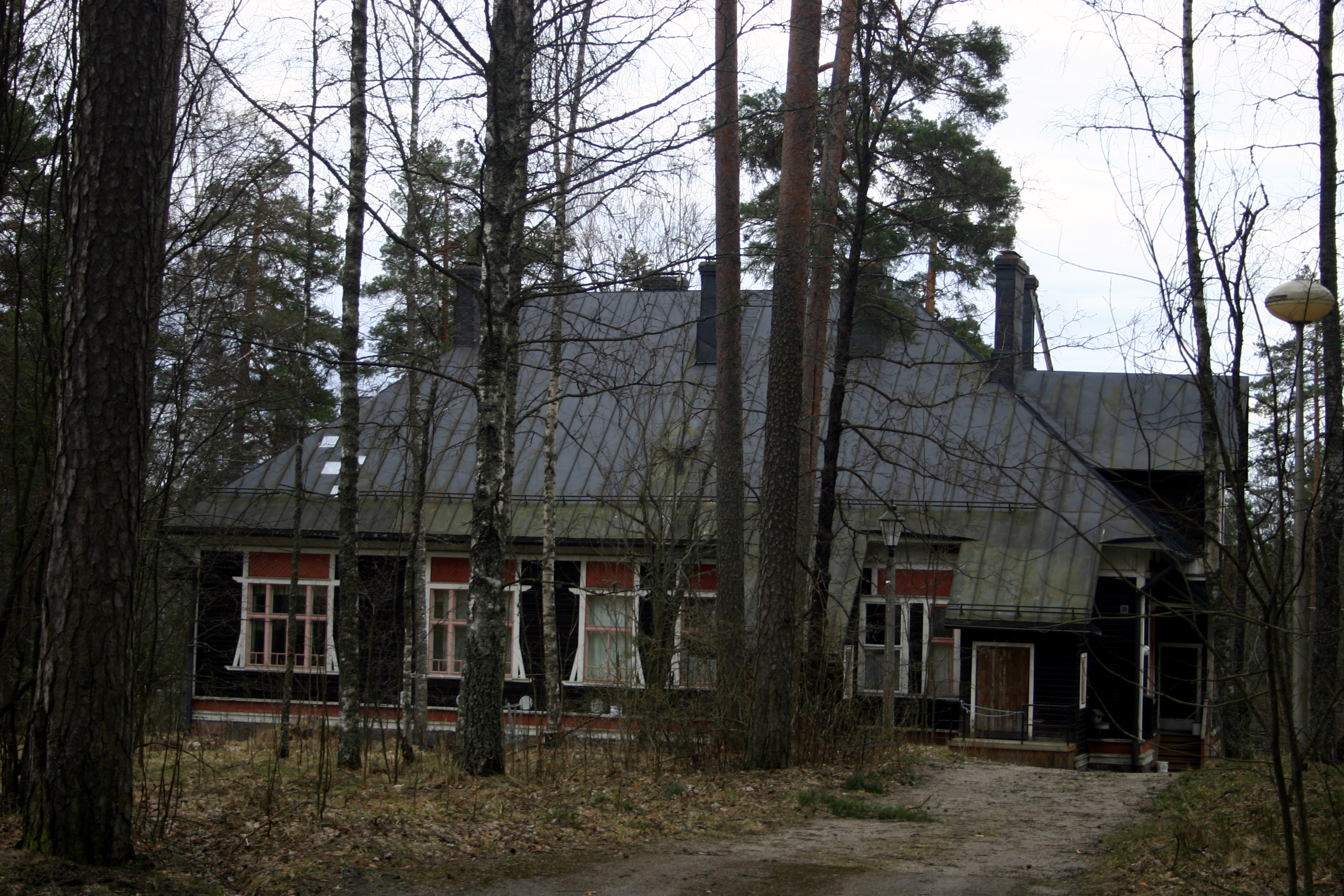 Entinen Nummelan parantolan ylilääkärin huvila, myöhemmin potilasosasto 4.